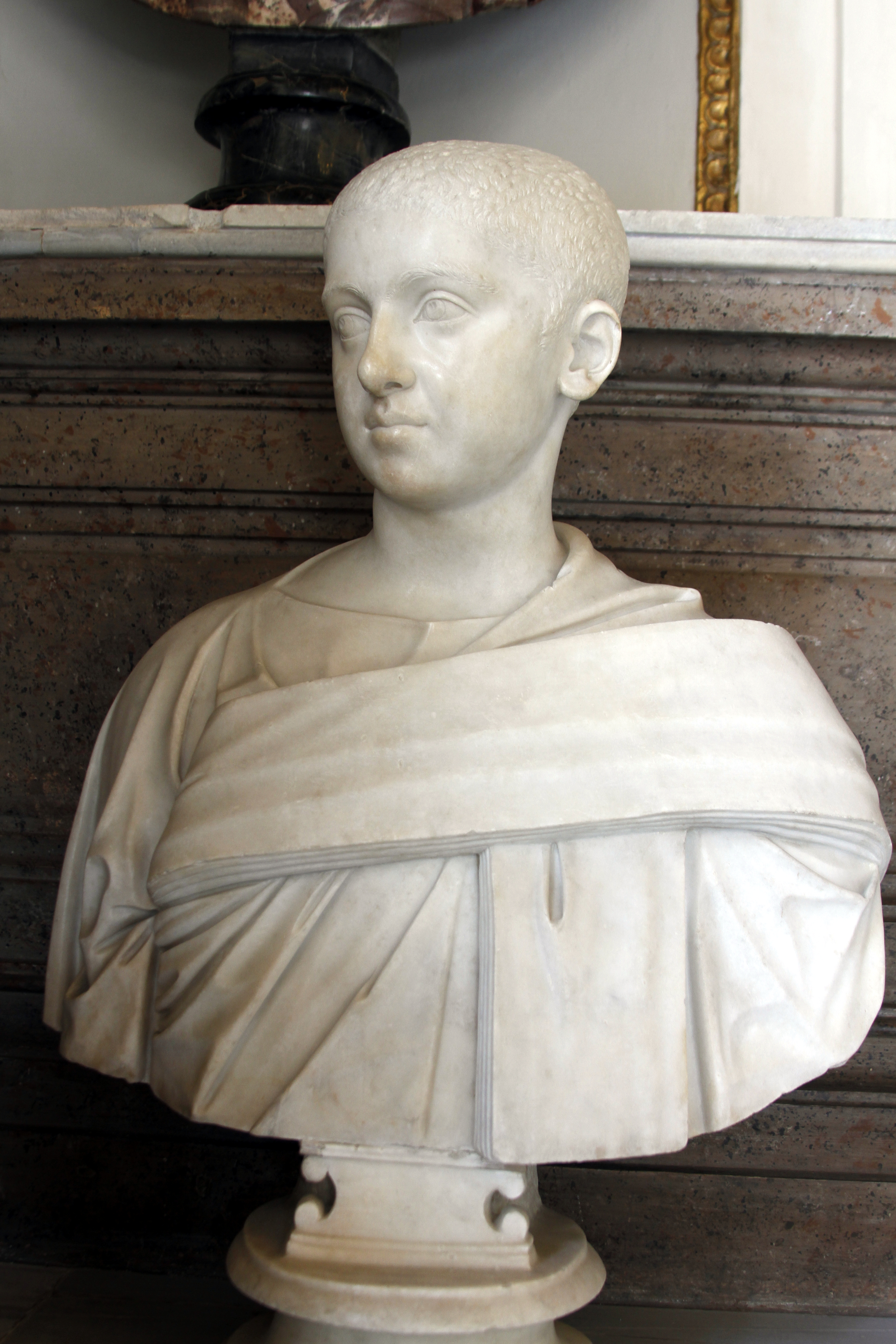 Palazzo Nuovo - Musei Capitolini - Rome